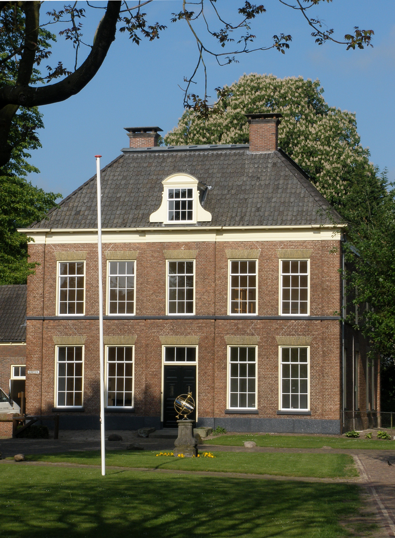 De Oudste Pastorie aan het Kerkplein in de Nederlandse plaats Delden is een rijksmonument. Het pand stamt uit 1854.